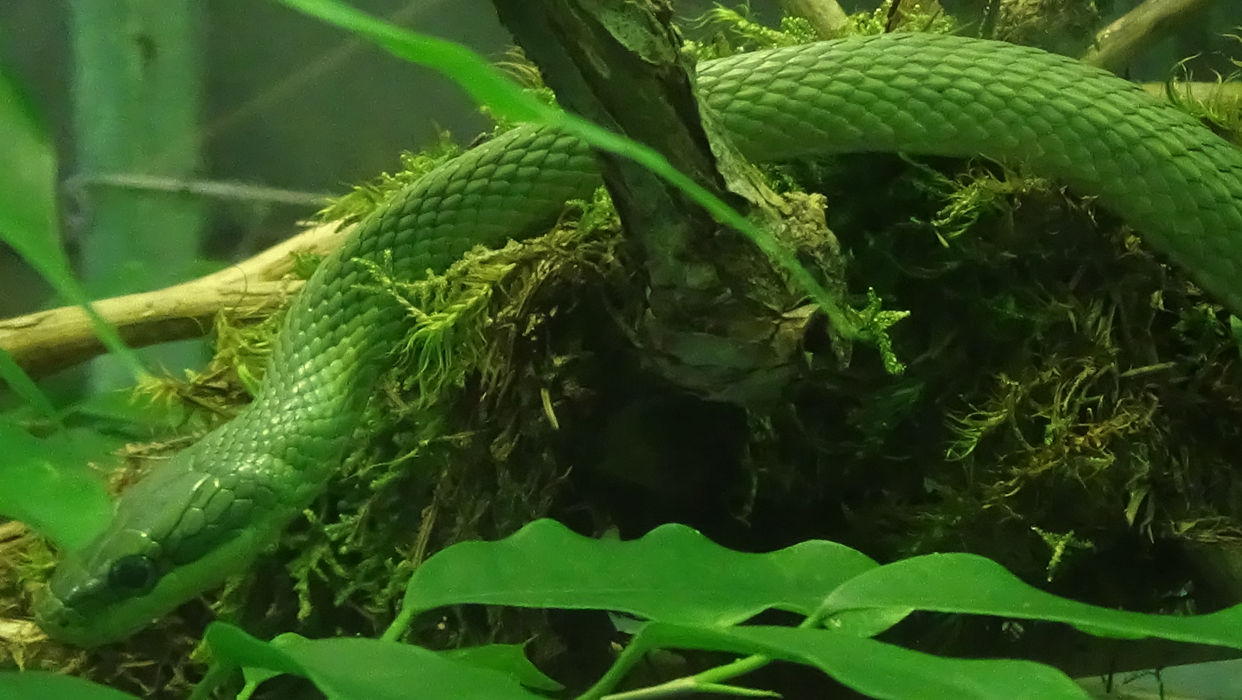 Rhynchophis prasinus - spécimen adulte - Ménagerie du jardin des plantes de Paris, ile de France, France - 11/2014